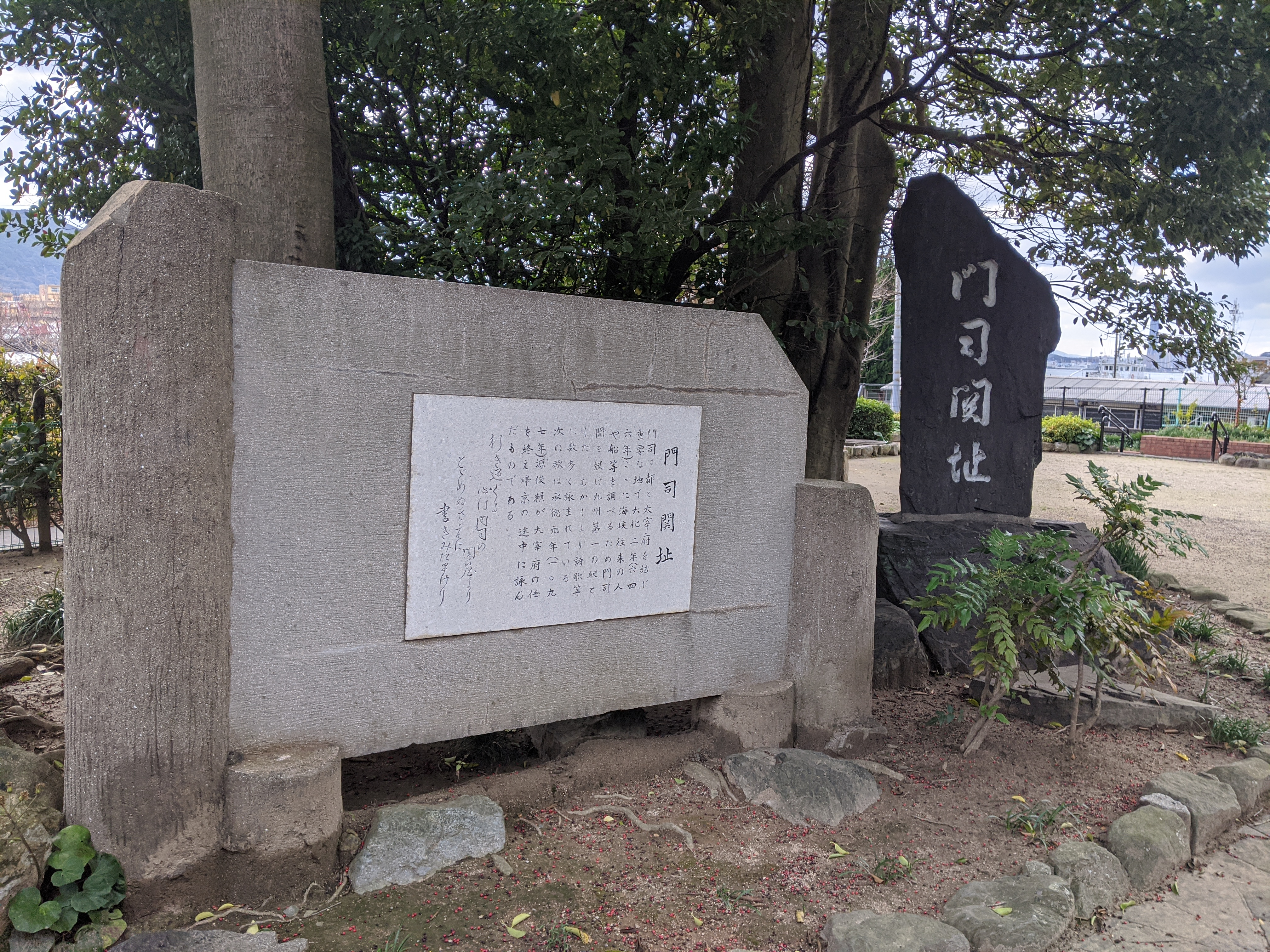 古代の門司関址の記念碑（和布刈神社一の鳥居横の公園内）